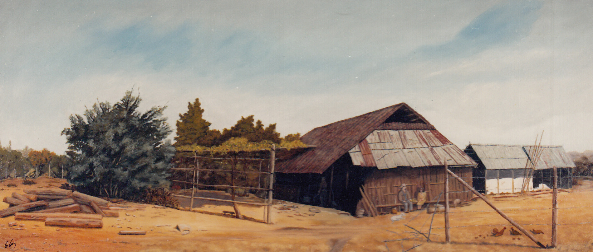 Pintura de Eugenio Cruz Vargas (1923 - 2014). Técnica: óleo sobre tela. Tema: caserío del poblado del mismo nombre situado al poniente de Santiago, comuna de Melipilla. Puengue fue en épocas pretéritas un asentamiento de los originarios indios Picones, donde se conservan "piedras tacitas", rocas oradadas que servían para moler el trigo y semillas antes de la llegada del conquistador hispano. Medidas: 60 x 130 cm. Autora de la fotografía: Liliana Fuentes, quien por el consentimiento del propietario titular de los derechos de autor de la obra, publica esta fotografía en internet bajo la Licencia de Uso Creative Commons, Atribución-Compartigual 3.0 Unported (CC BY-SA 3.0).